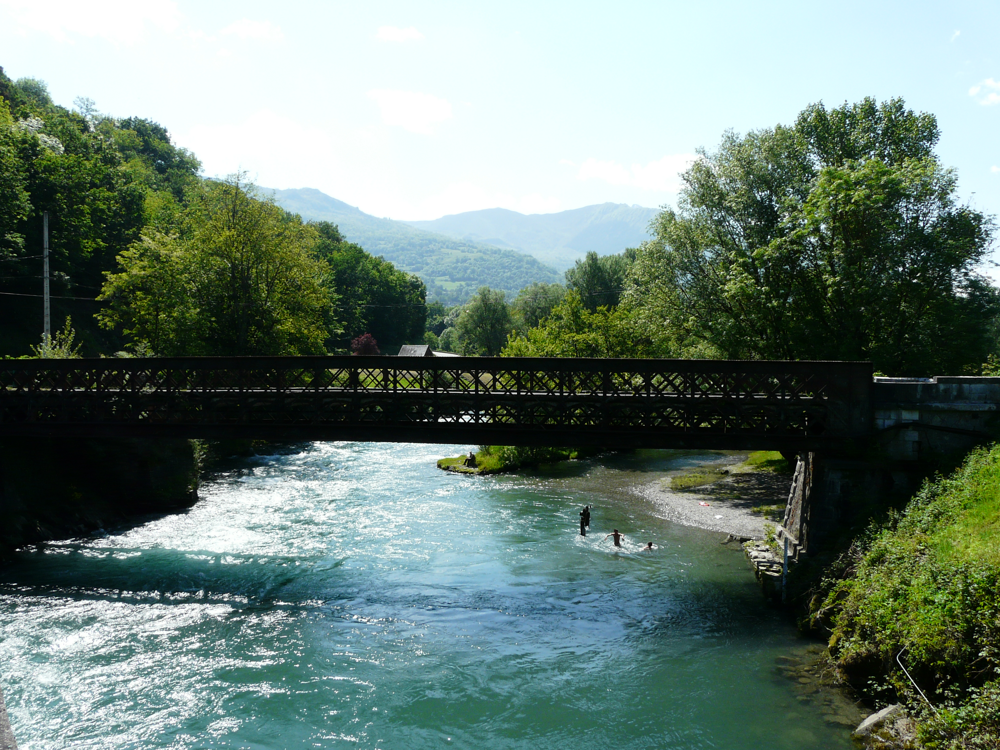 En amont du pont de la route départementale 100, le gave de Pau marque la limite entre Ayros-Arbouix (à gauche) et Argelès-Gazost (à droite),Hautes-Pyrénées, France.